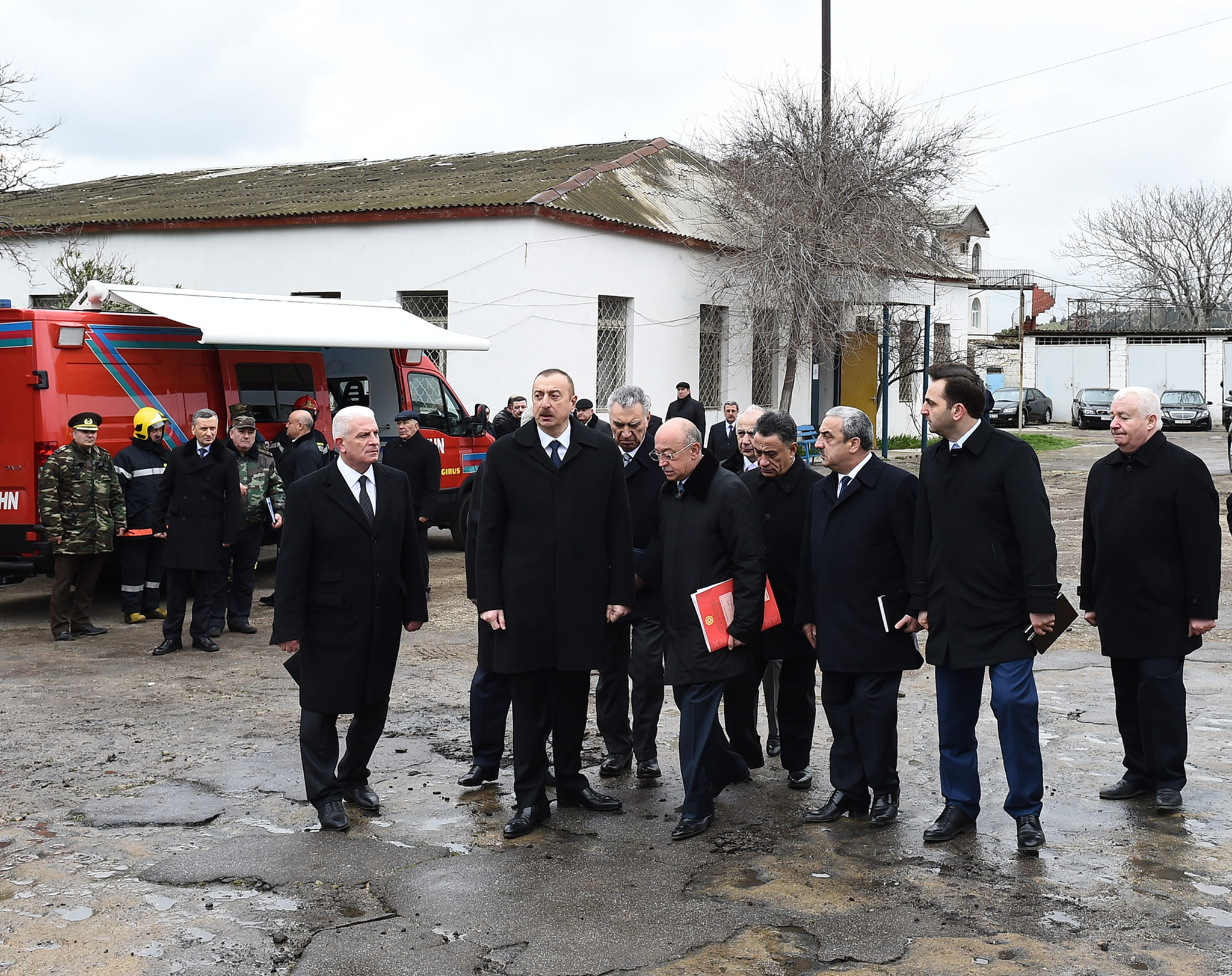 İlham Əliyev yanğın baş verən Respublika Narkoloji Mərkəzinə gələrək vəziyyətlə tanış olub